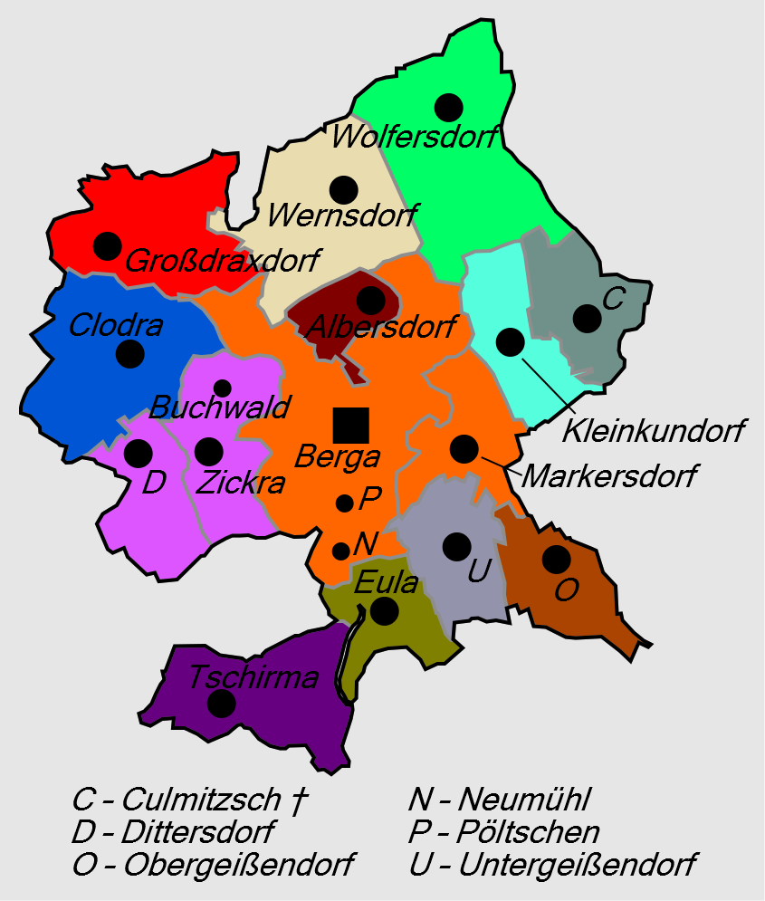 Gliederung der Stadt Berga/Elster ab 8. März 1956